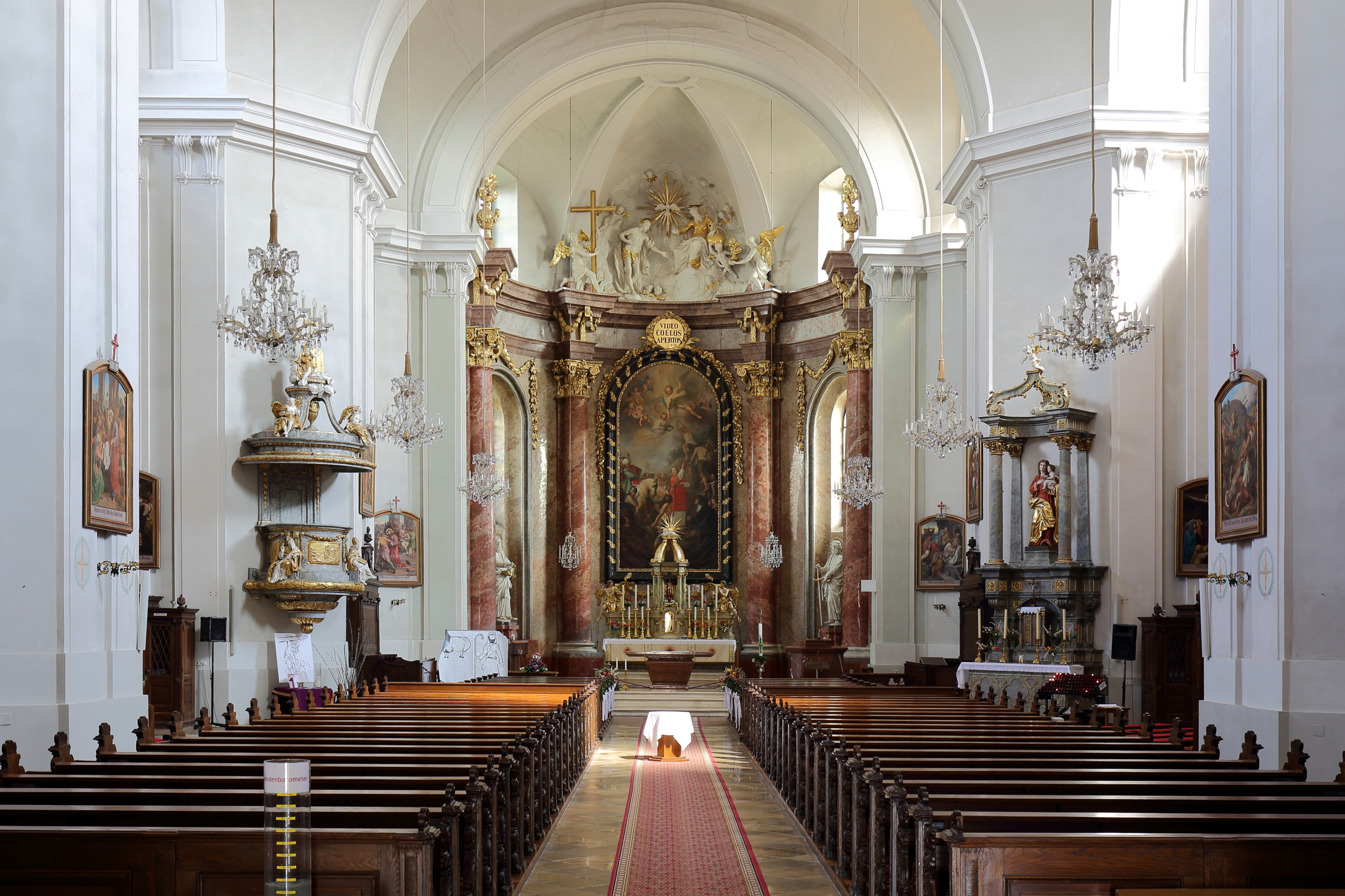 Innenansicht Richtung Hochalter der katholischen Stadtpfarrkirche hl. Stephan in der niederösterreichischen Stadt Stockerau. Der imposante, die gesamte Apsis einnehmender Hochaltar wurde naich einem Entwurf von Martin Keller ausgeführt. Das Hochaltarbild ist ein Werk aus dem Jahr 1777 von Johann Meidinger (1733-1806) und stellt das Martyrium des hl. Stephanus dar.